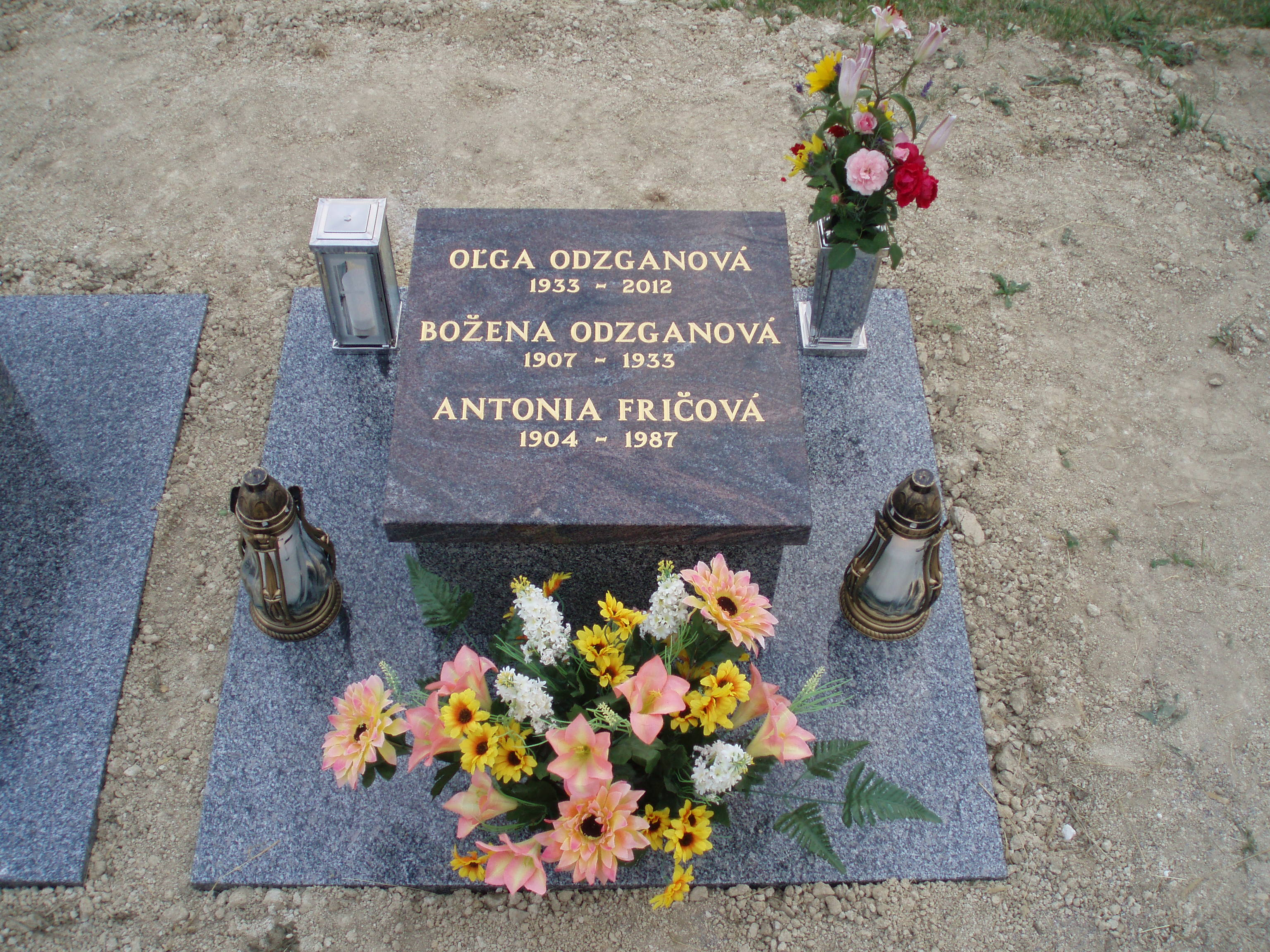 Miesto posledného odpočinku cintorín - Opatovce nad Nitrou...